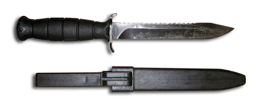 Glock Feldmesser 81 (im Gegensatz zu Feldmesser 78 mit Sägerücken)